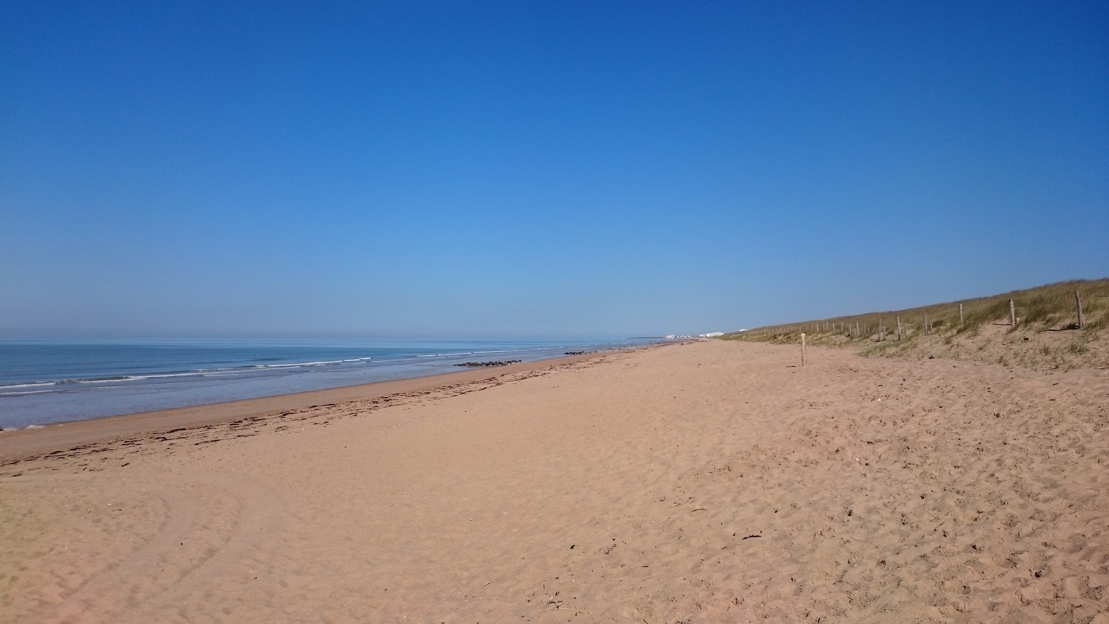 grande plage de Sion-sur-l'Océan